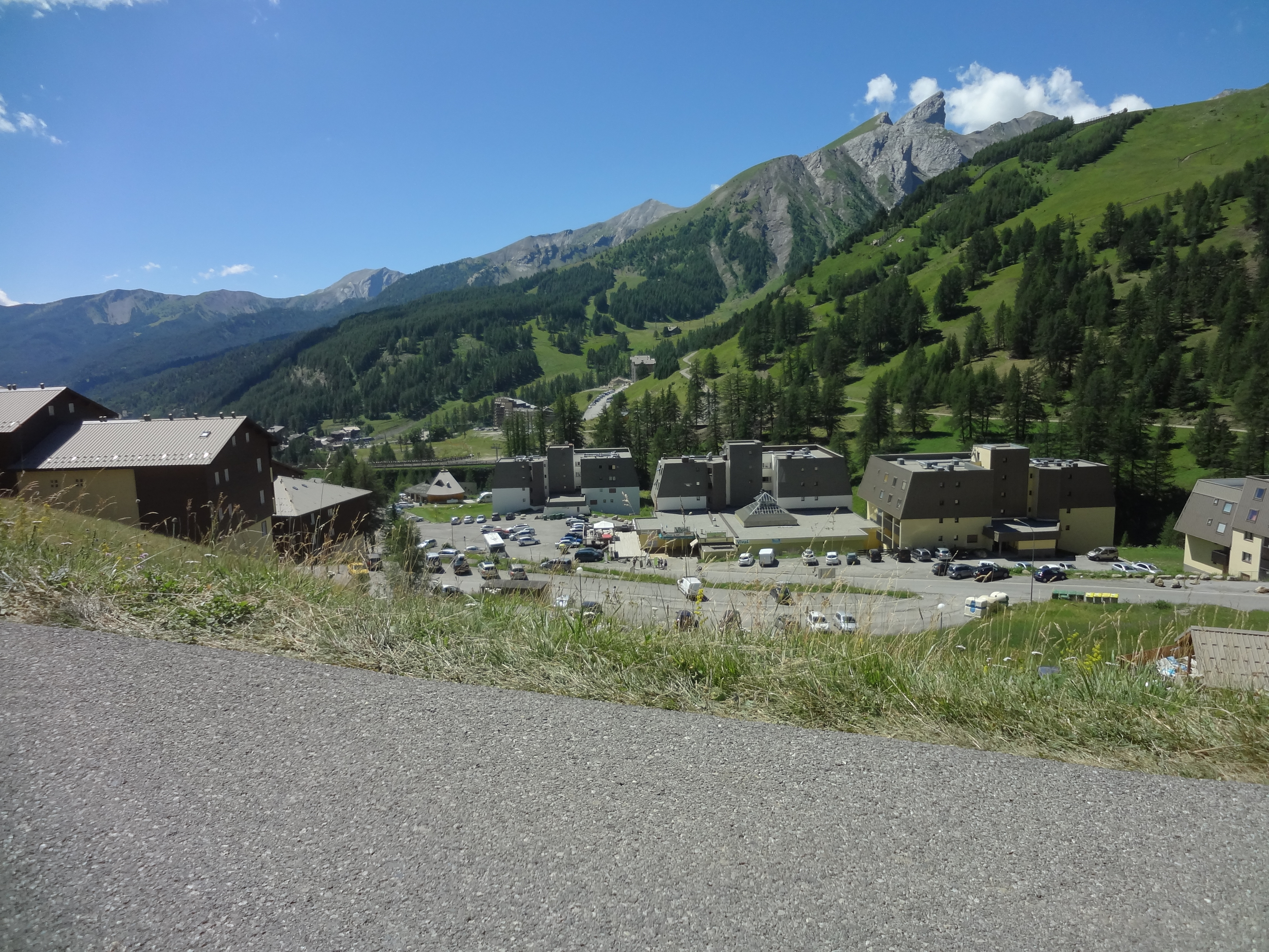 La station de ski dépend de la commune d’Allos.